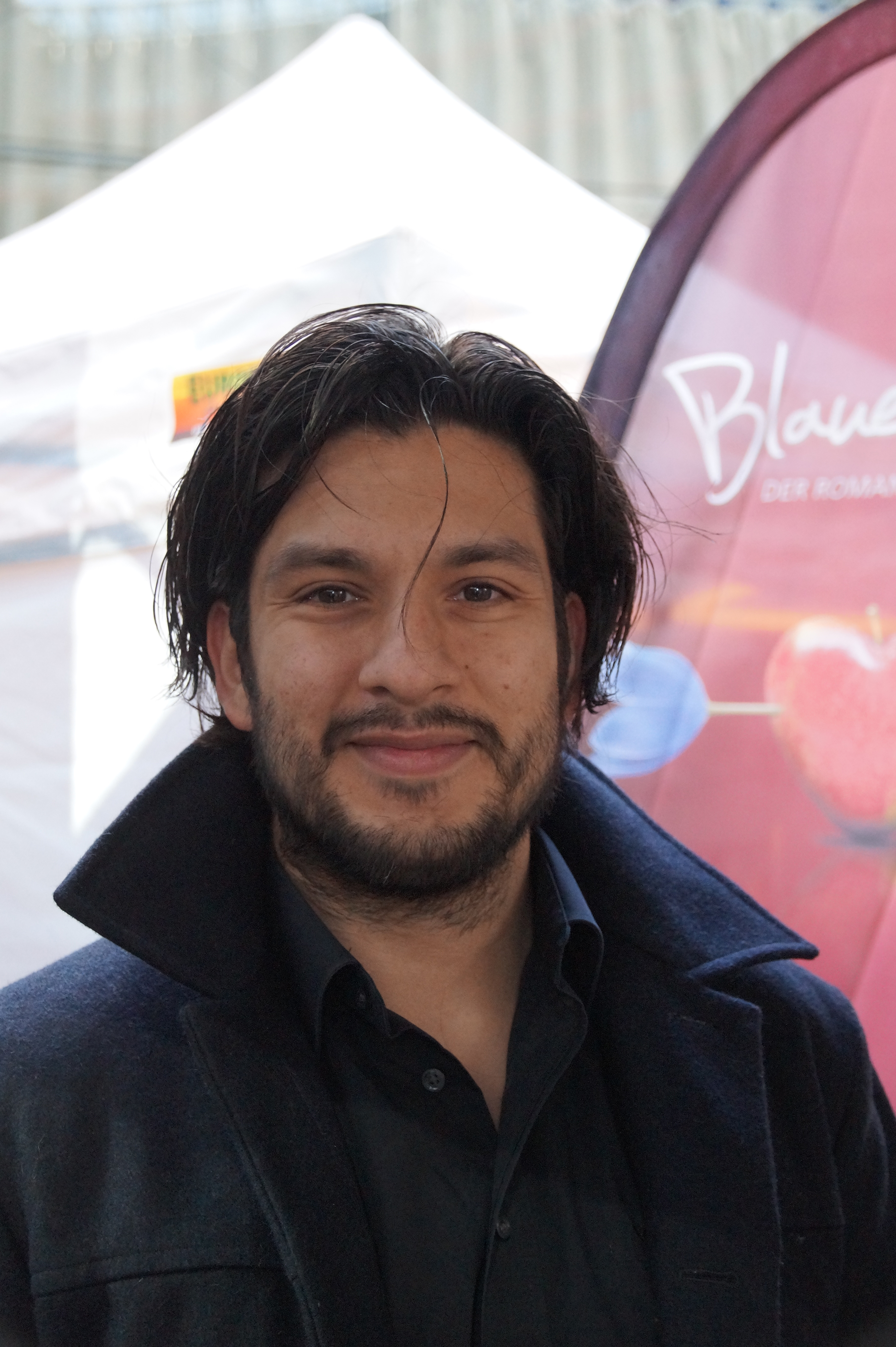 Francisco Medina bei der Verleihung des Kurzfilmpreises "Blaue Blume", am 10.02.2016, im Sony Center Berlin.